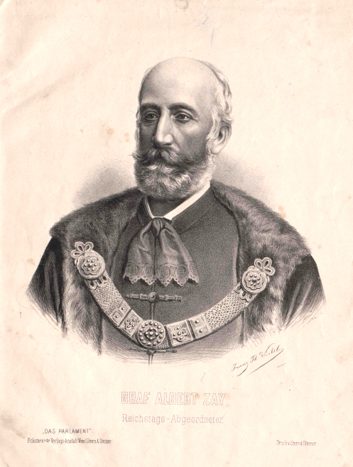 Zay-Csömör, Albert Graf (1825 - 1904)